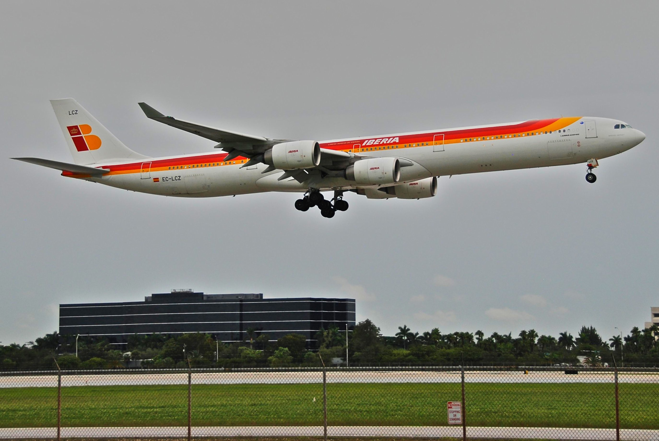 IBERIA Airbus A340-600; EC-LCZ@MIA;17.10.2011/626no